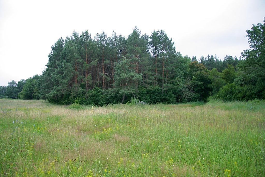 Казённый лес рядом с деревней Потуловка